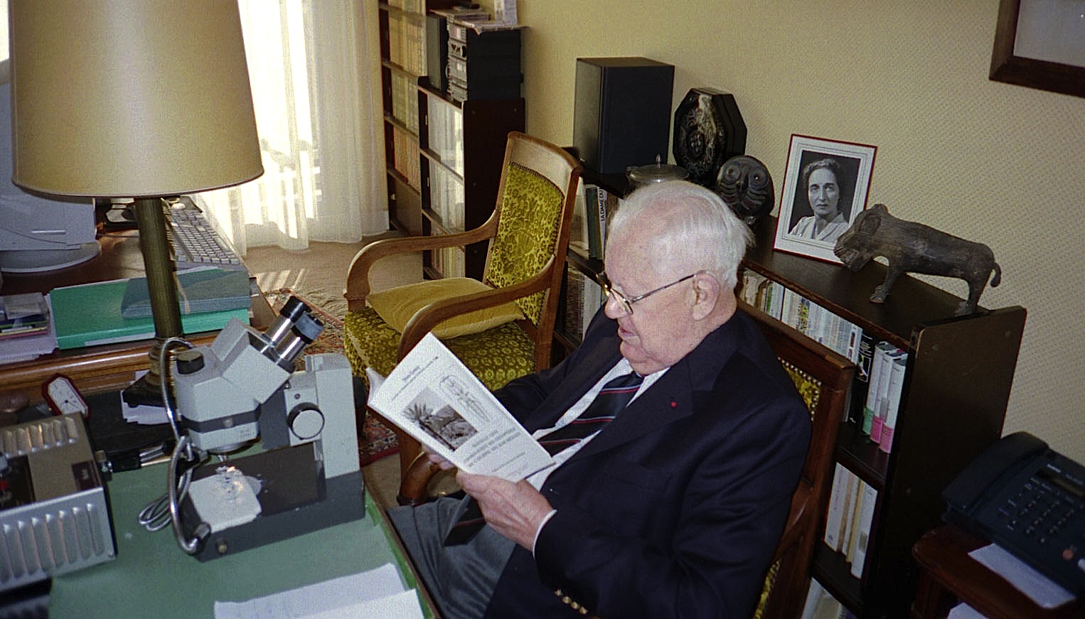 Renaud Paulian à Bordeaux le 11 septembre 2001